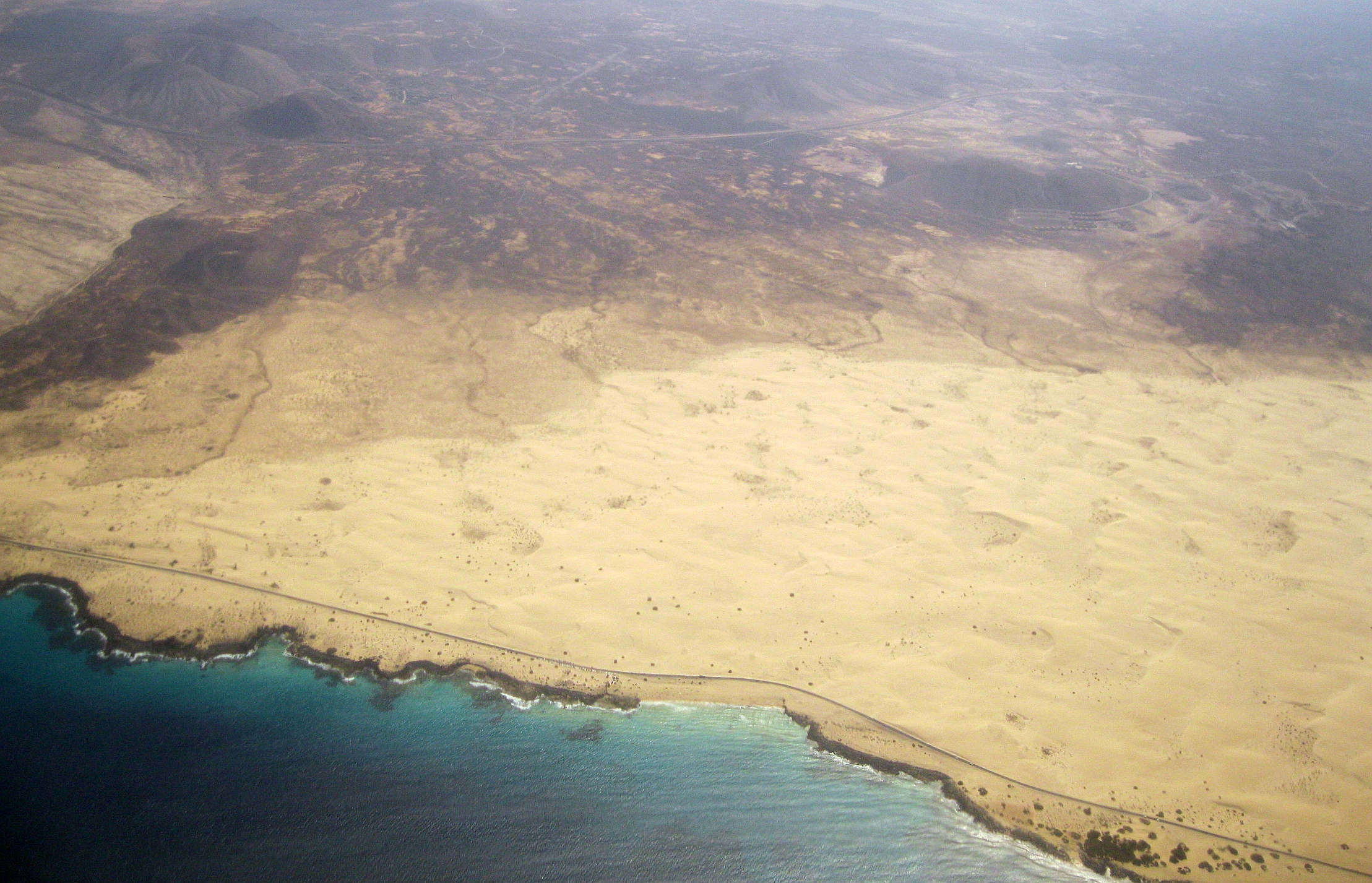 Parque Natural de las Dunas de Corralejo